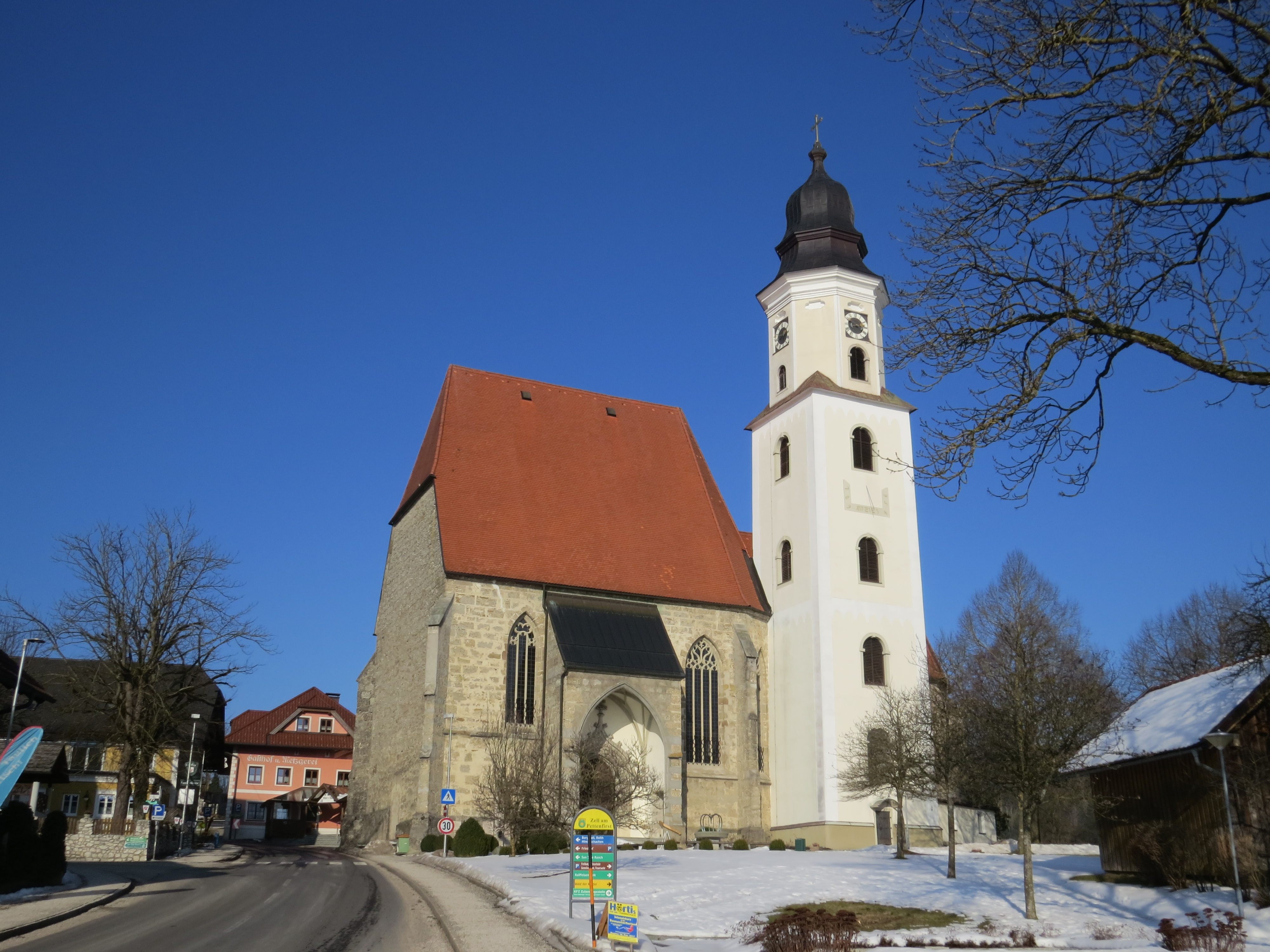 Kath. Pfarrkirche Mariä Heimsuchung und ehem. Friedhofsfläche